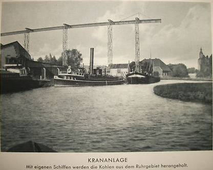 Nordhorn